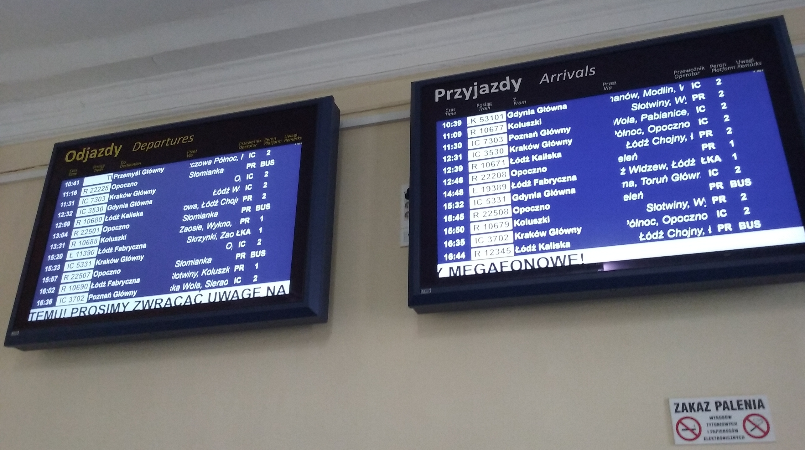 Tomaszów Mazowiecki w województwie łódzkim, PL, EU. Tablice informacyjne na tomaszowskim dworcu kolejowym. CC0